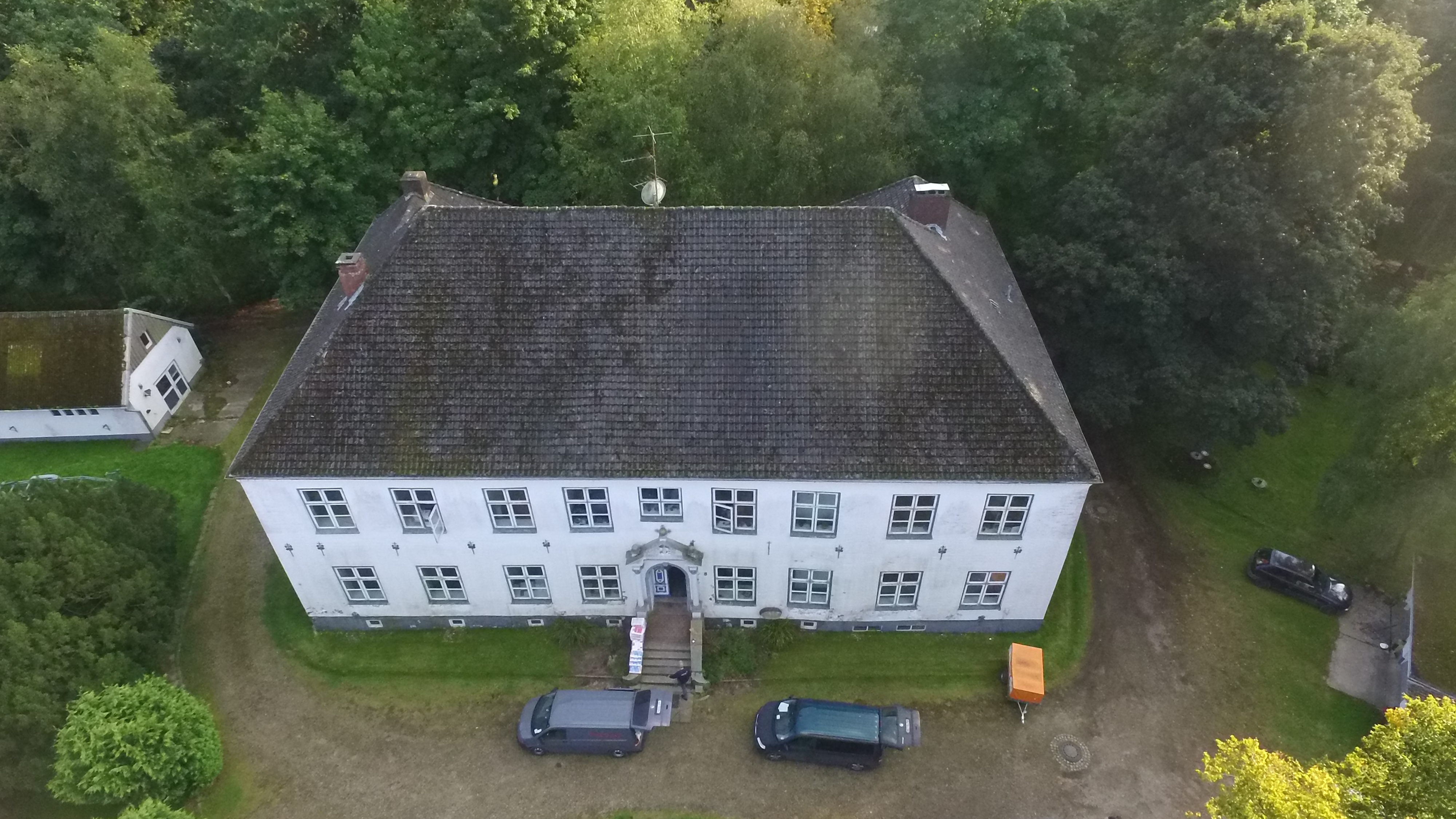 Herrenhaus Klein Nordsee im Kreis Rensburg-Eckernförde.